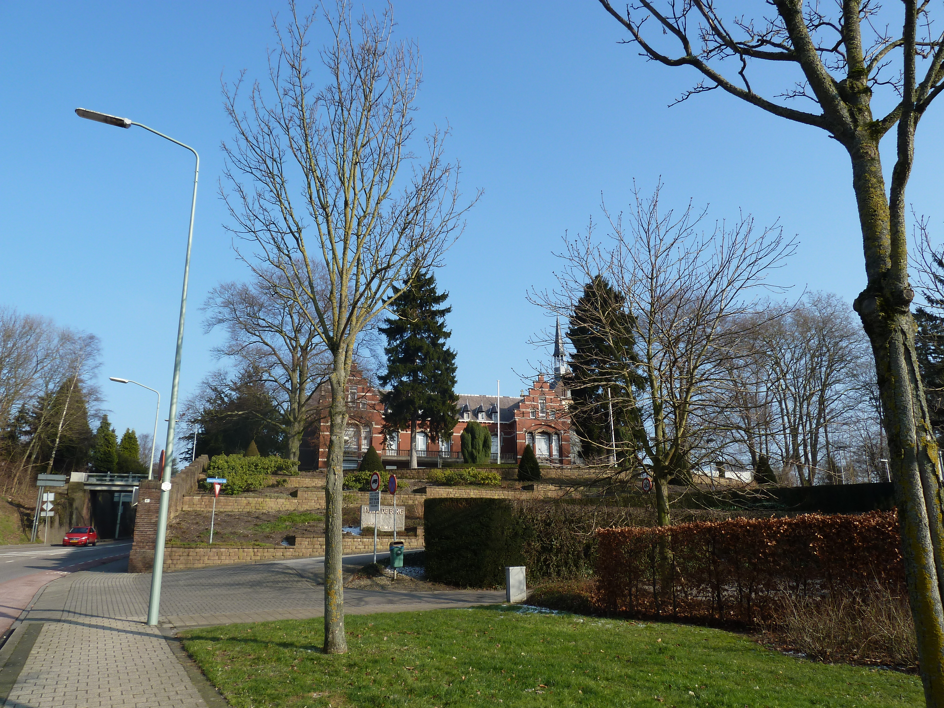 Huize De Berg, Heerlen, Limburg, Nederland